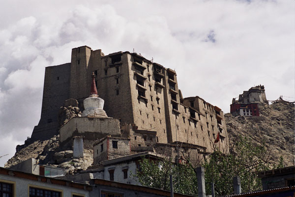 El palau de Leh (Ladakh, Índia)